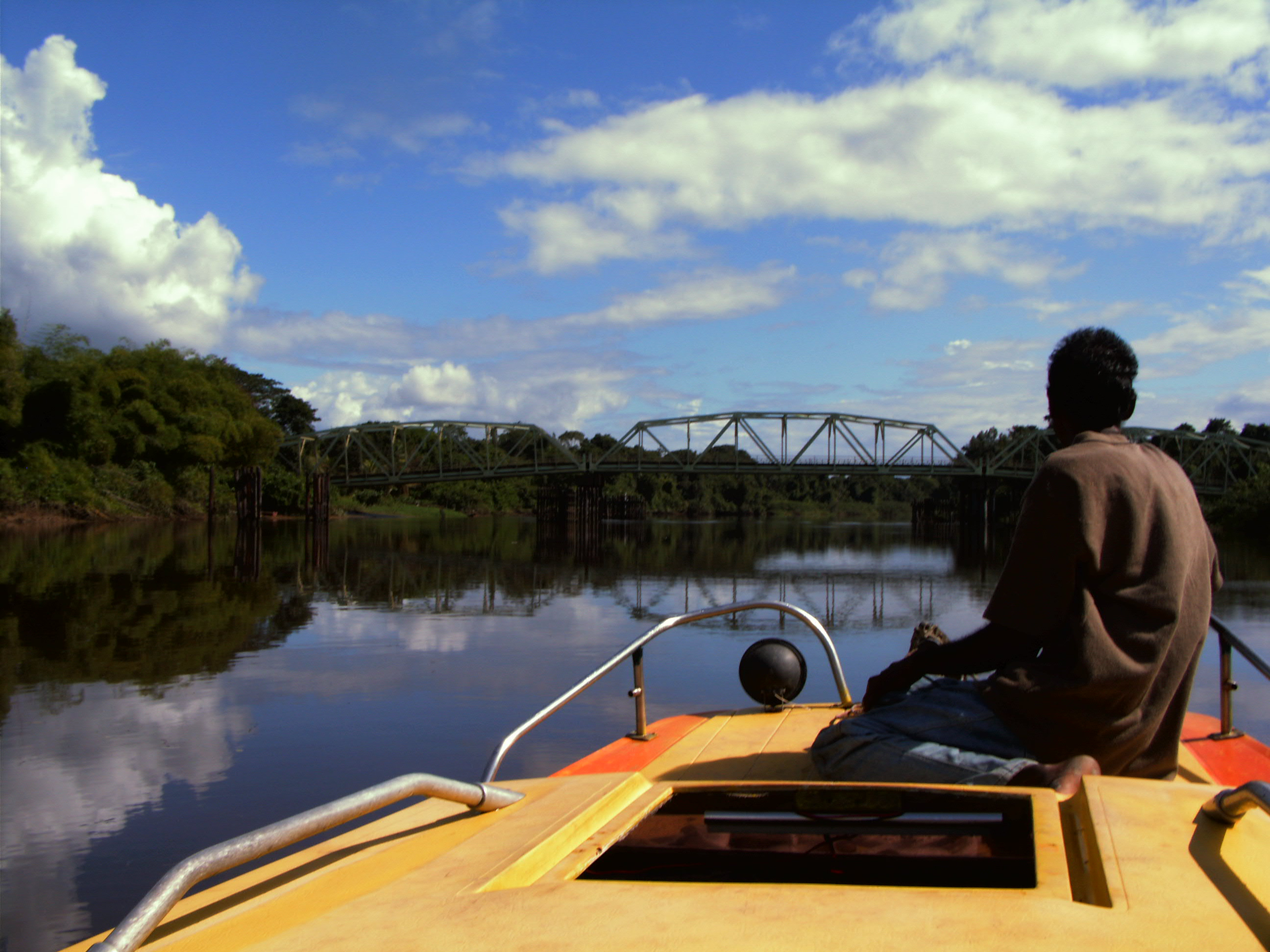 Foto im Dezember 2006 vom Nutzer Brokopondo selbst erstellt und als gemeinfrei (PD) eingestellt. Auf dem Bild ist vom Boot aus die einzige, 1980 gebaute Brücke über den Commewijne-Fluss, als Bestandteil der Ost-West-Verbindung in Suriname zu sehen.